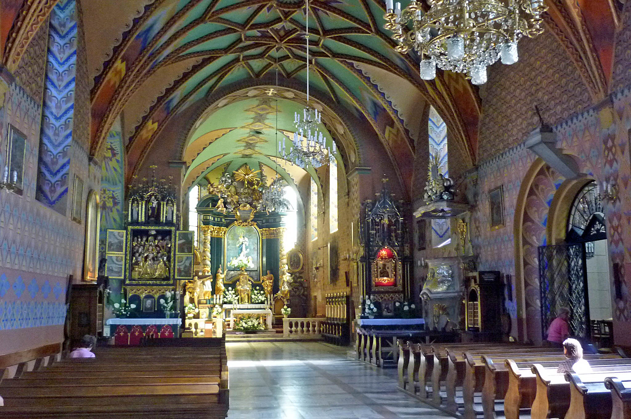 Kirchenraum der Konkathedrale in Saybusch (Żywiec)